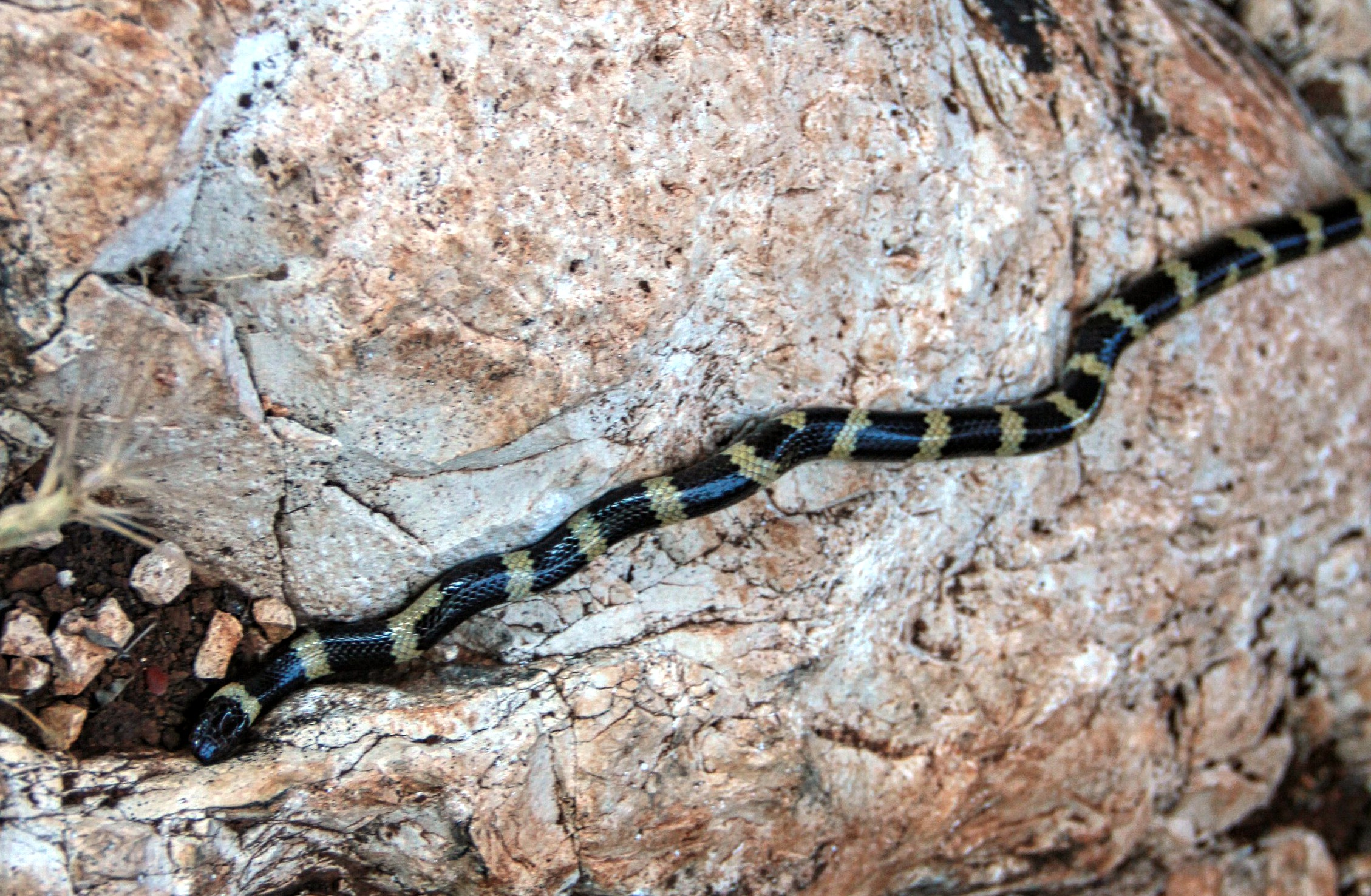 מחרוזן הטבעות - Micrelaps muelleri הר שומרה 6.2017 Northern Israel